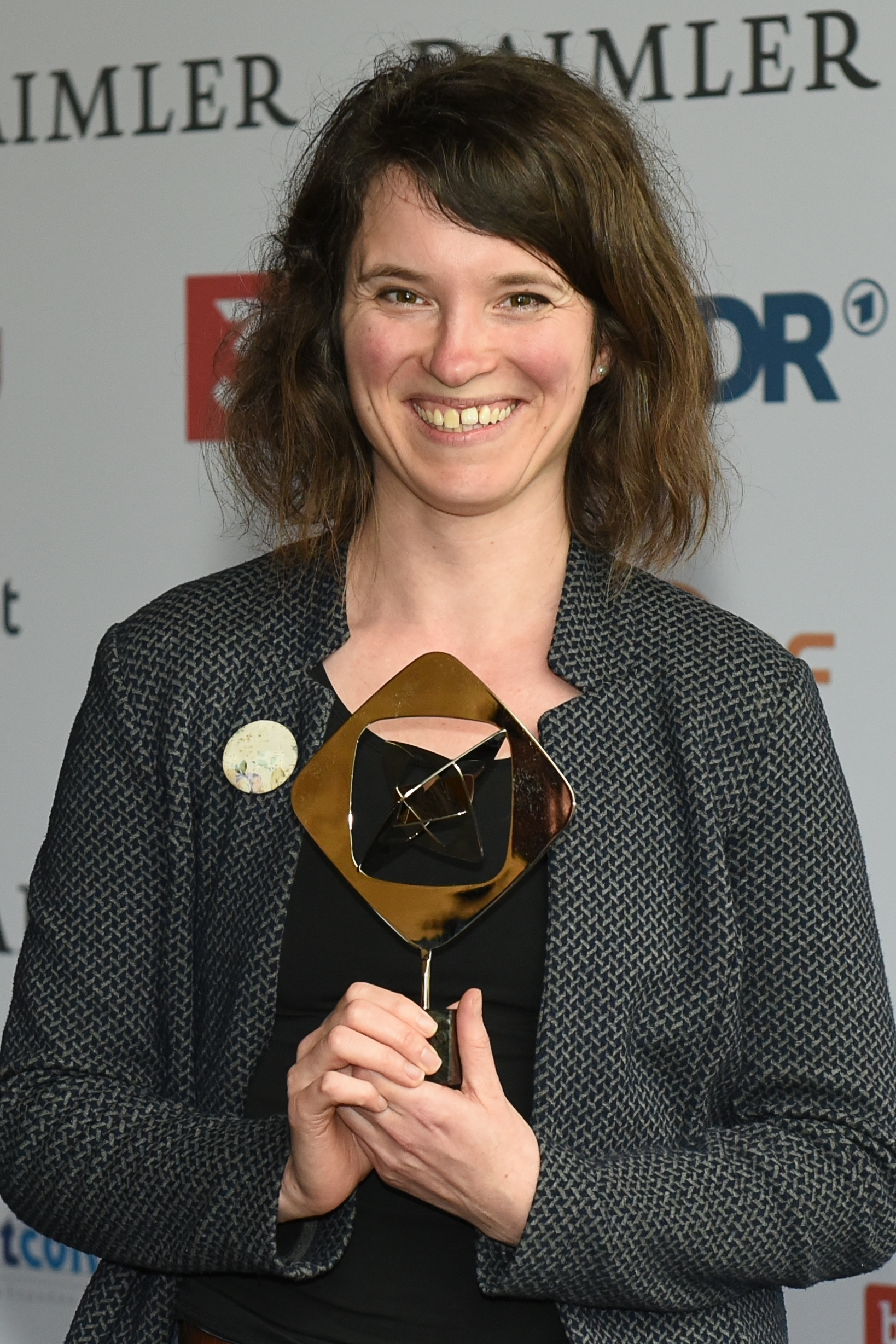 Verleihung des Grimme-Preises 2019.